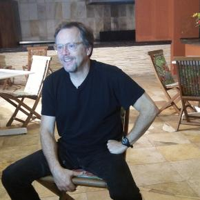 Cineasta brasileiro Fernando Meirelles em imagem do acervo da TV Brasil.